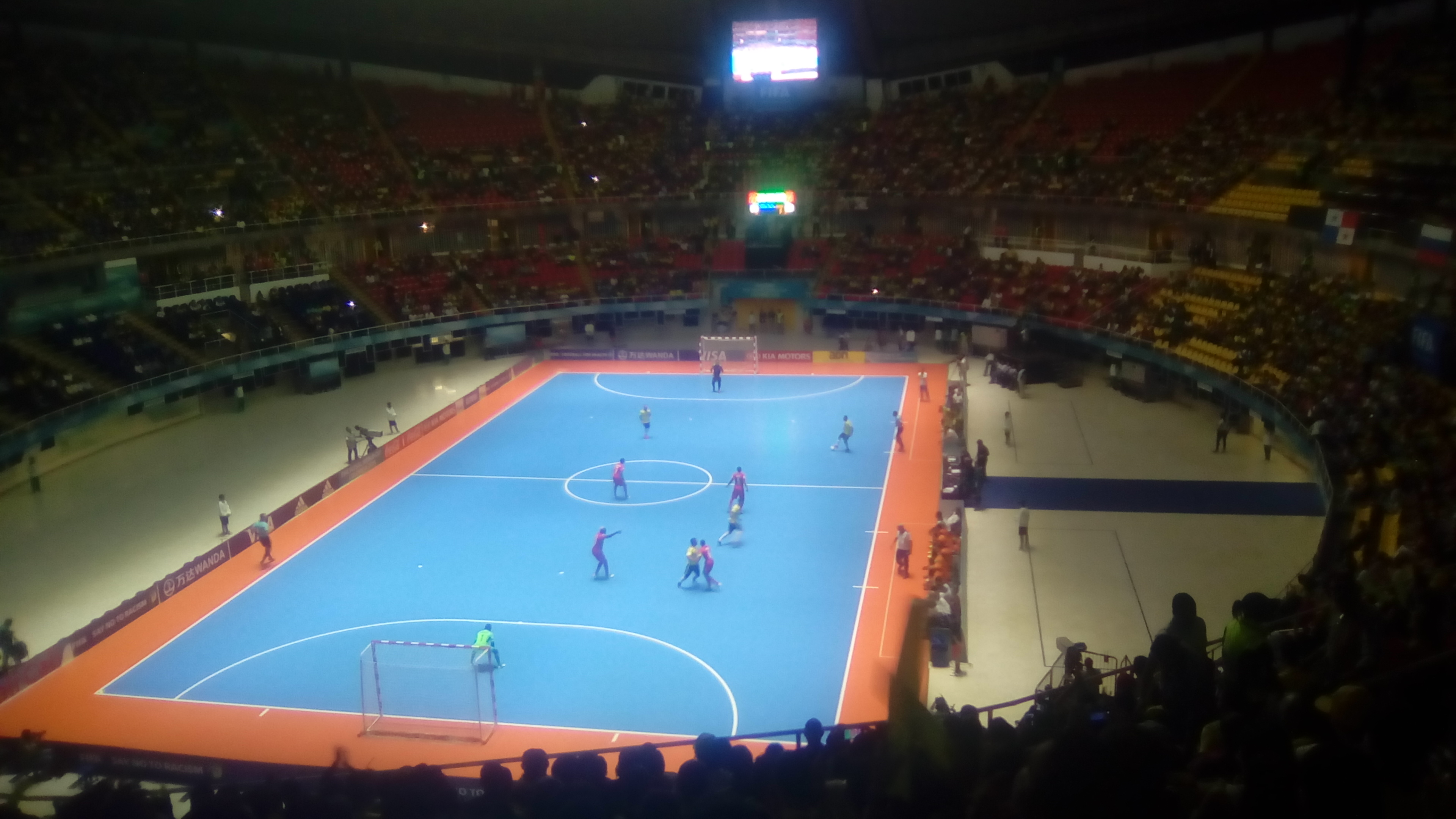 Partido por la tercera fecha del grupo A del Mundial de Fútsal de la FIFA. Colombia venció a Panamá 4-3 y se clasificó a la siguiente fase.